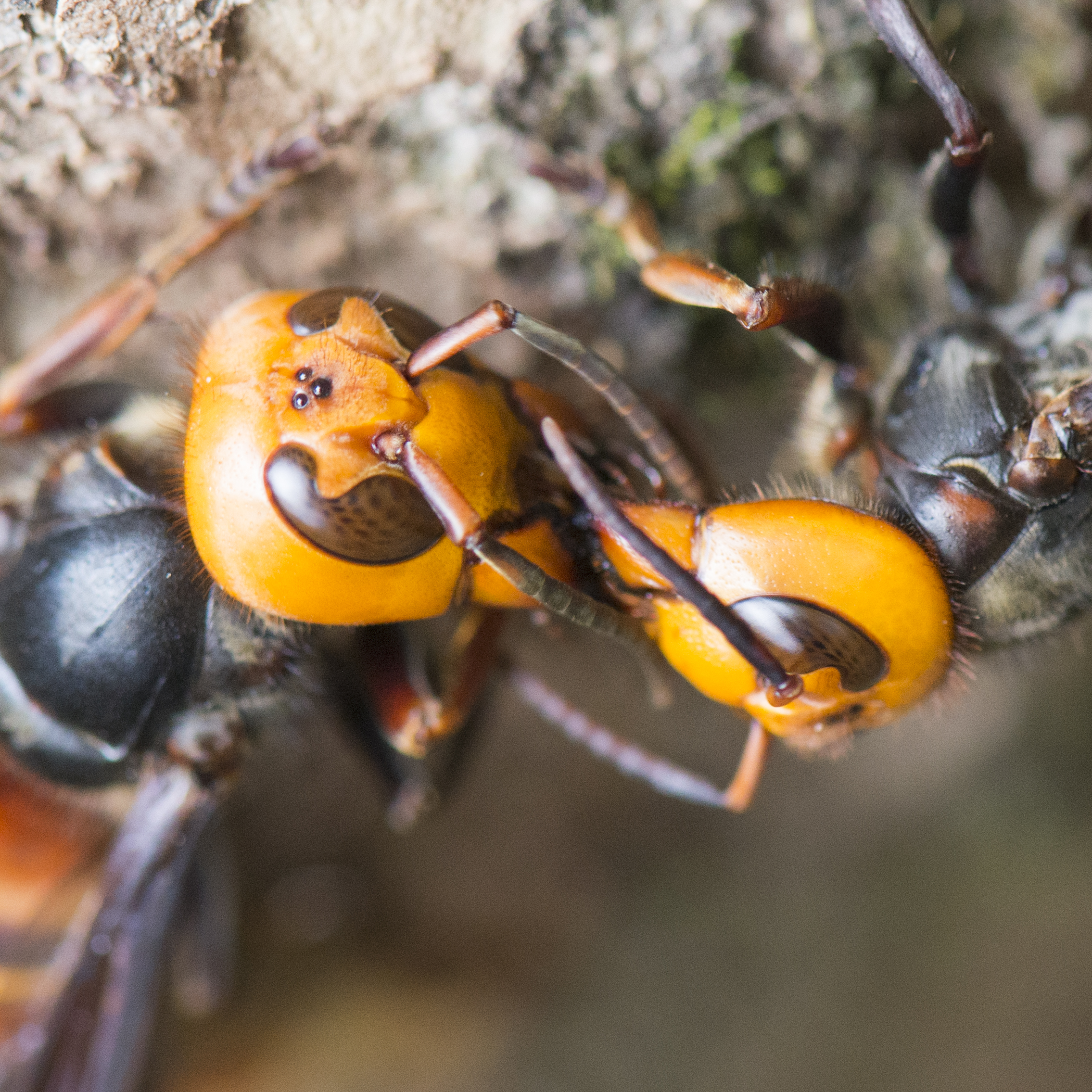 _ESJ0222 Vespa mandarinia